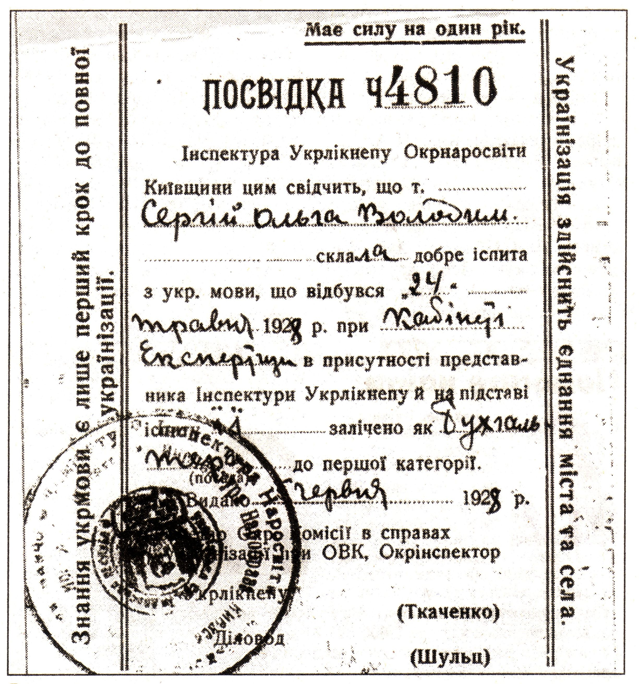 Справка ("Посвідка") о сдаче бухгалтером Сергей Ольгой Владимировной экзаменов на знание украинского языка, без которой не принимали в УССР на работу. Киевская область, 1928. Фамилия получателя - "Сергей" - также украинизирована.(Племянников В. Бабушка как эталон //«2000» (общественно-политический ежеденельник). — № 9 (500). — 5-11 марта 2010 года. — с. F2) Надписи: "Украинизация совершит объединение города и села" и "Знание украинского языка - только первый шаг к полной украинизации".